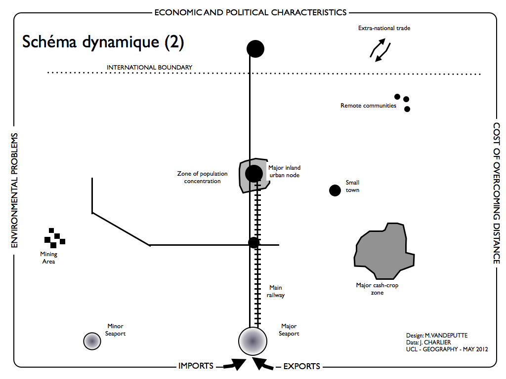 Schéma de développement d'un réseau de transport en Afrique Centrale